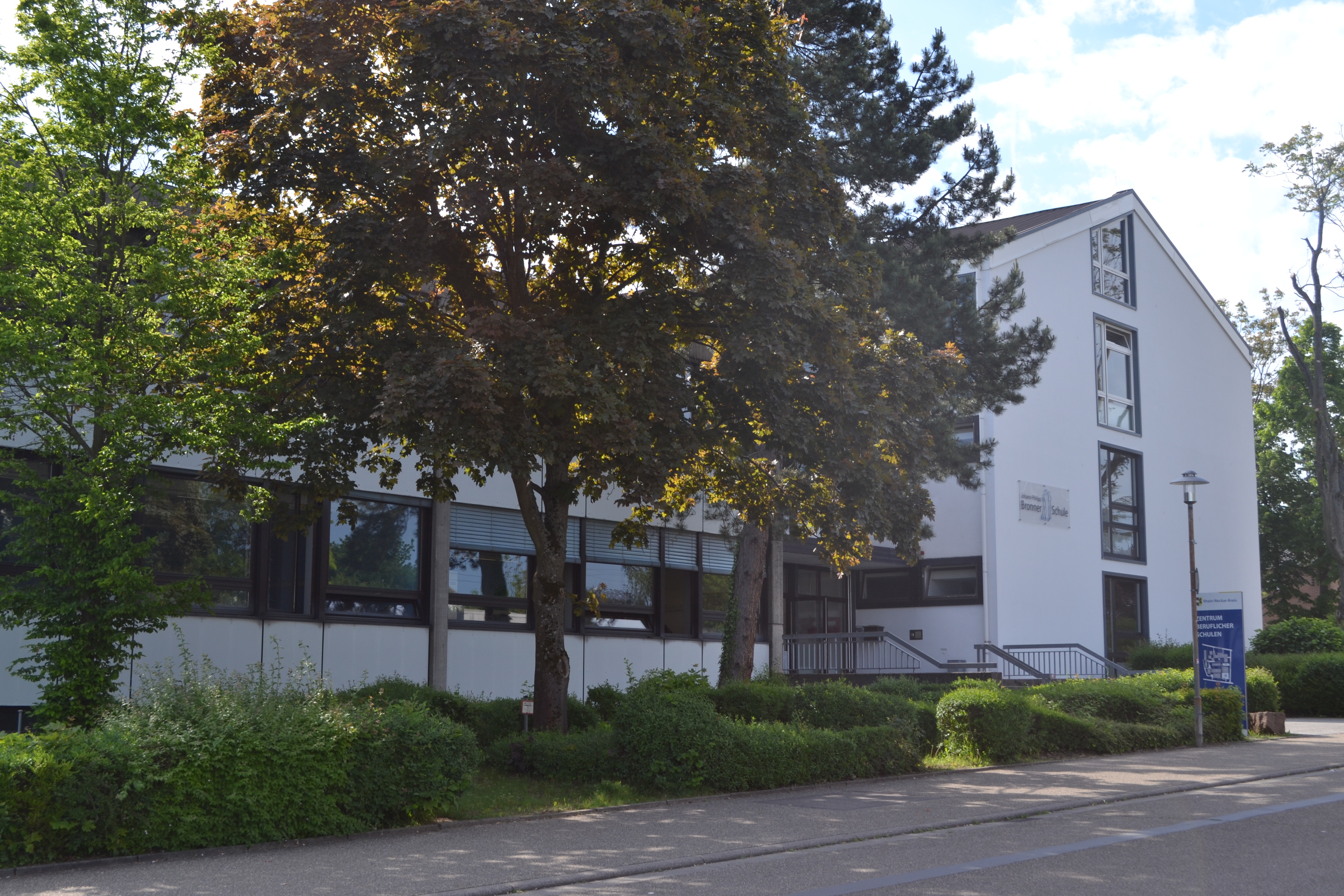 Johann-Philipp-Bronner-Schule Wiesloch, Februar 2017